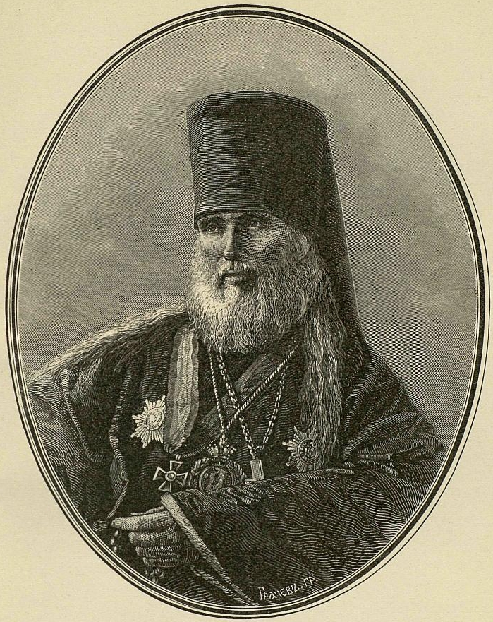 Philarète (Goumilevski)